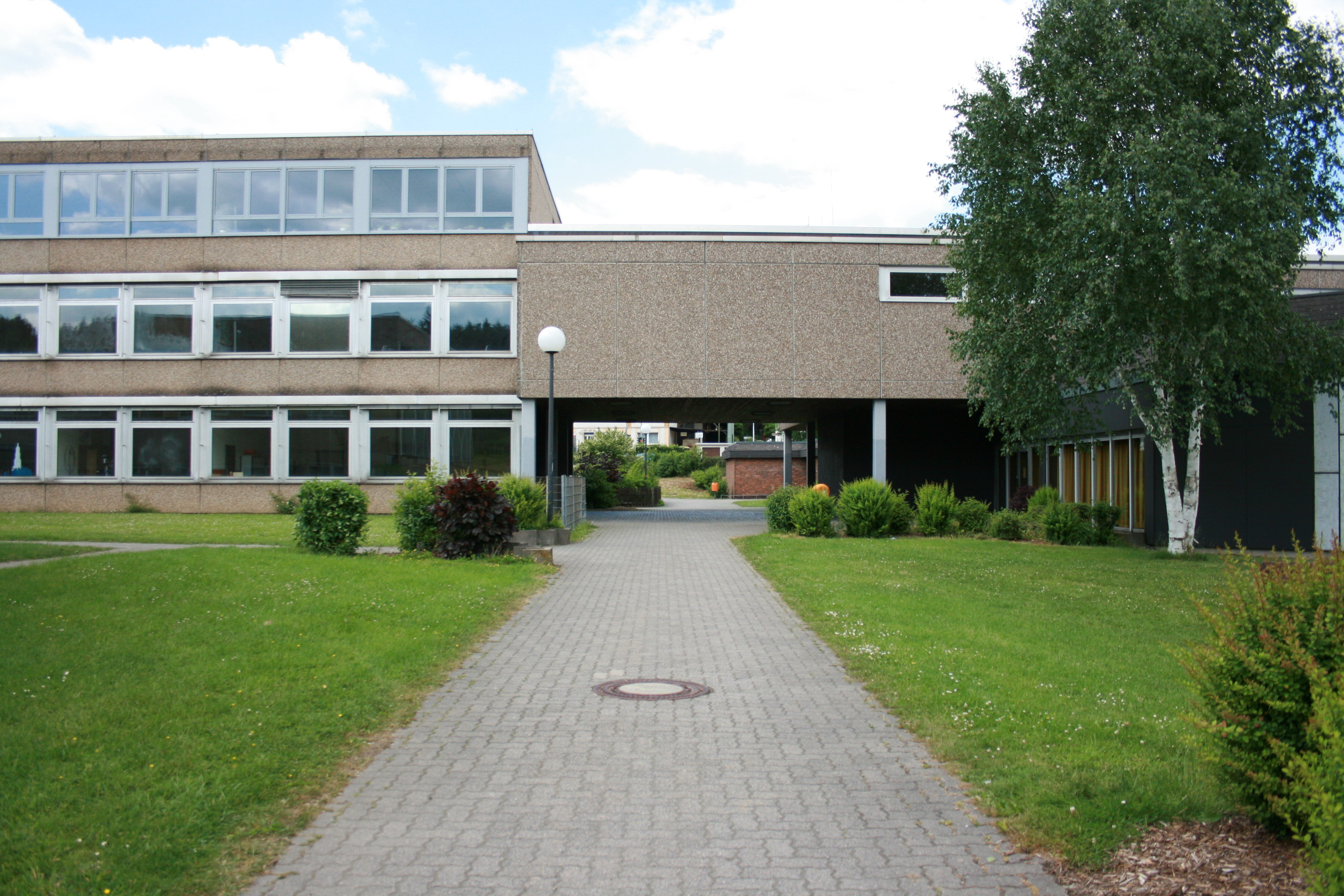 Gemeinschaftshauptschule, Niederheide in Neuenrade